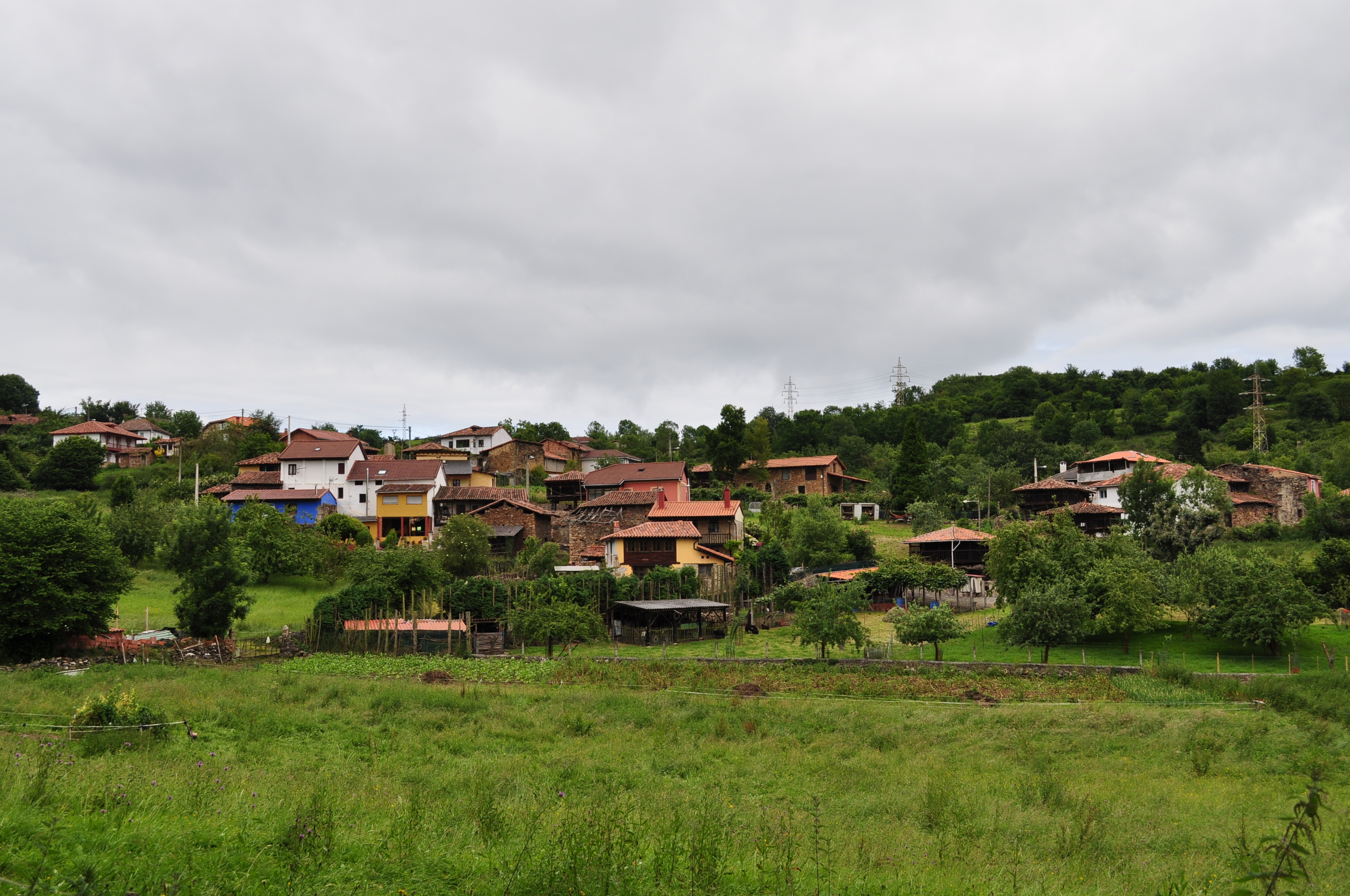 Perlavia, Trubia, Uviéu, Asturies, España.